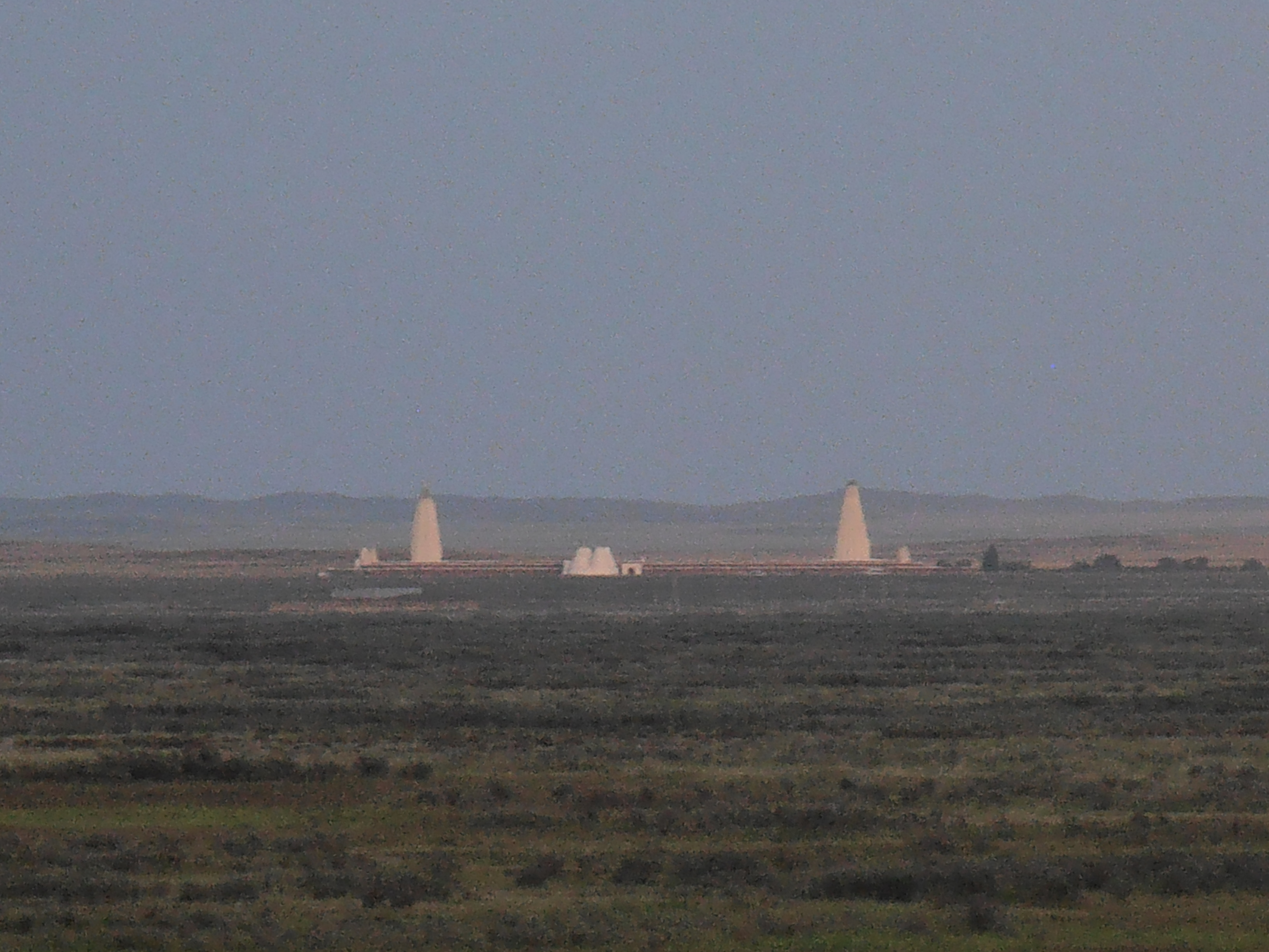 Вид сзади на мавзолей Абая Кунанбаева и Шакарима Кудайбердыева с мавзолея Кенгирбая-би Жандосулы. При создании снимка использовано увеличение в 10 раз.